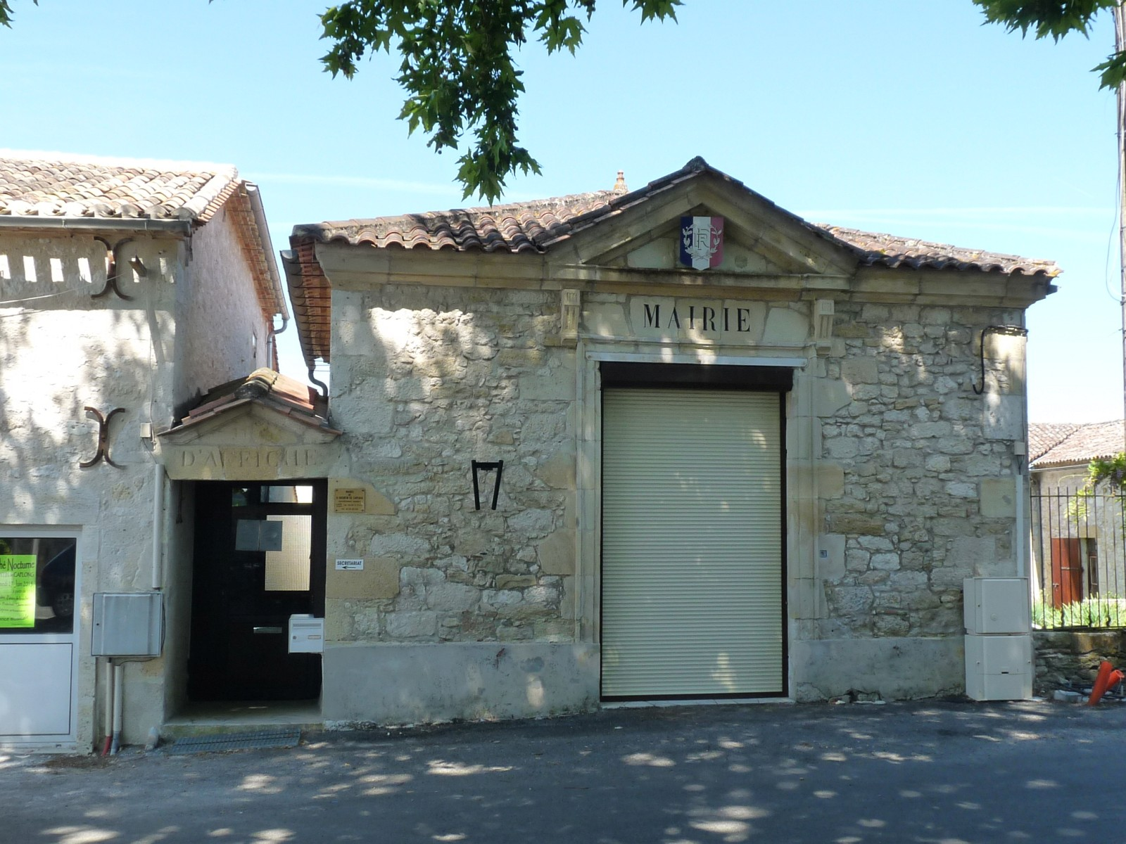 Mairie de St-Quentin-de-Caplong, Gironde, France